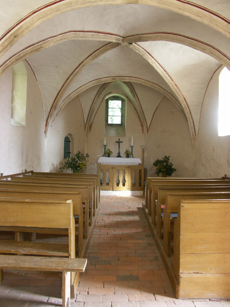 Inneres der Kirchkapelle Gessin in Basedow-Gessin